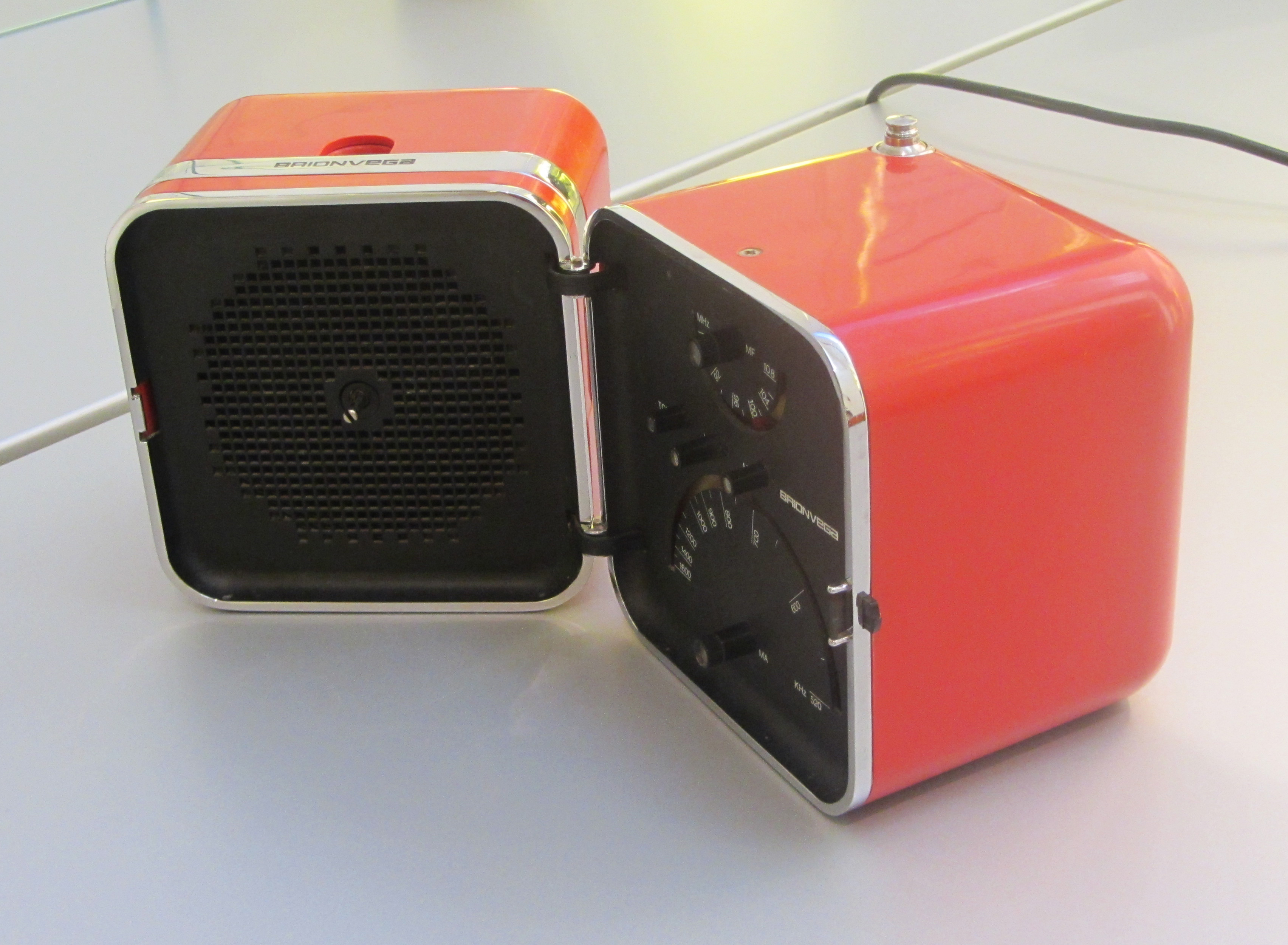 il radioricevitore TS 502 di Marco Zanuso e Richard Sapper per Brionvega (1965) esposto al Triennale Design Museum di Milano nel 2011